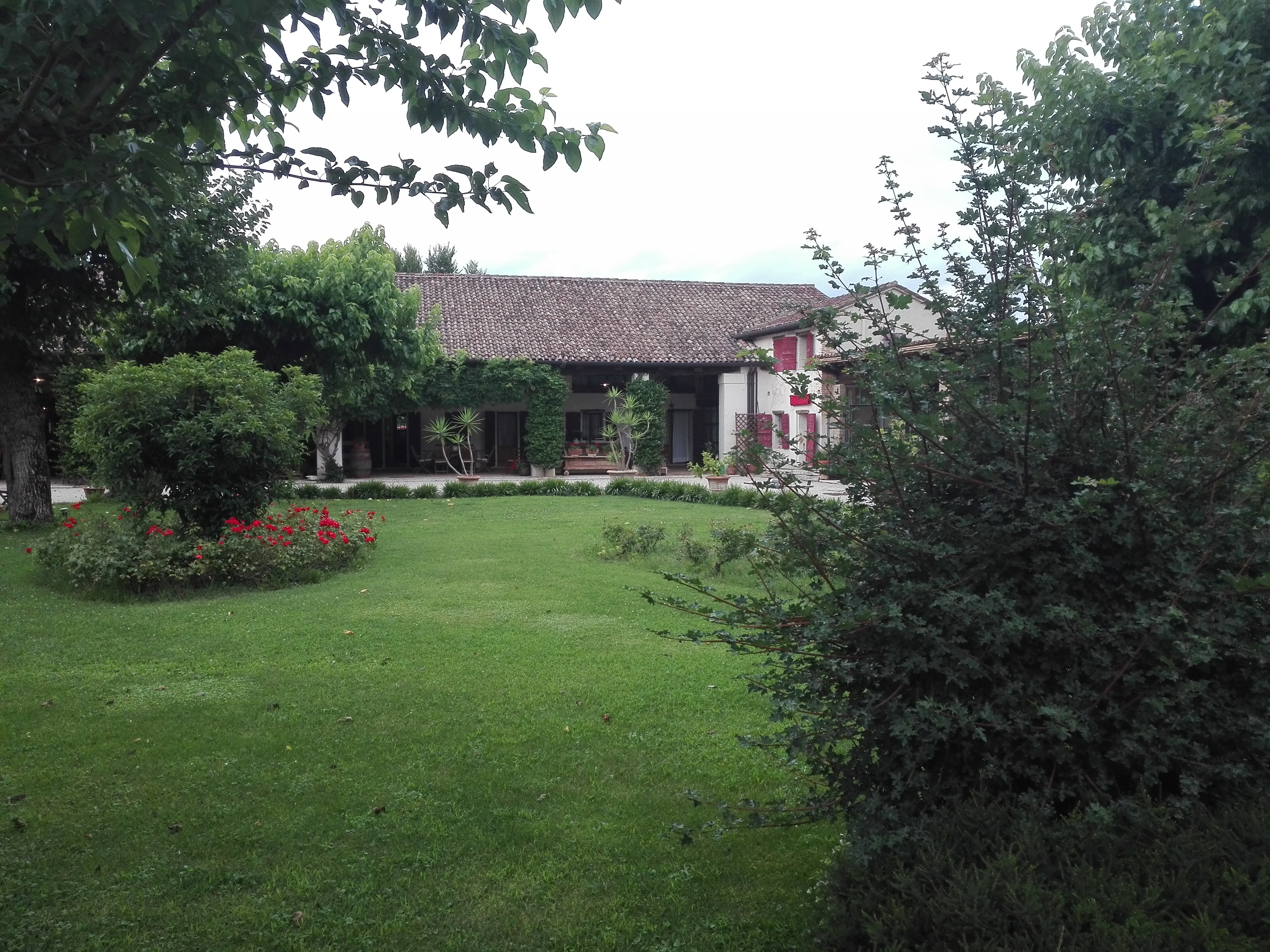 Ca' Cinel, in comune di Asolo